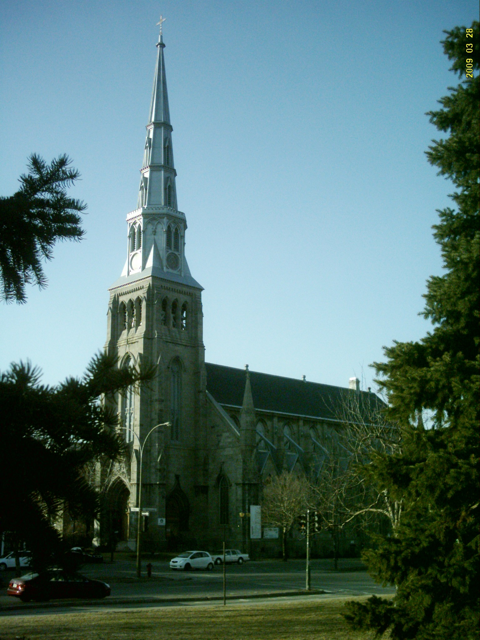 Église Saint-Pierre-Apôtre à Montréal, à l'angle du boulevard René-Lévesque et de la rue de la Visitation.